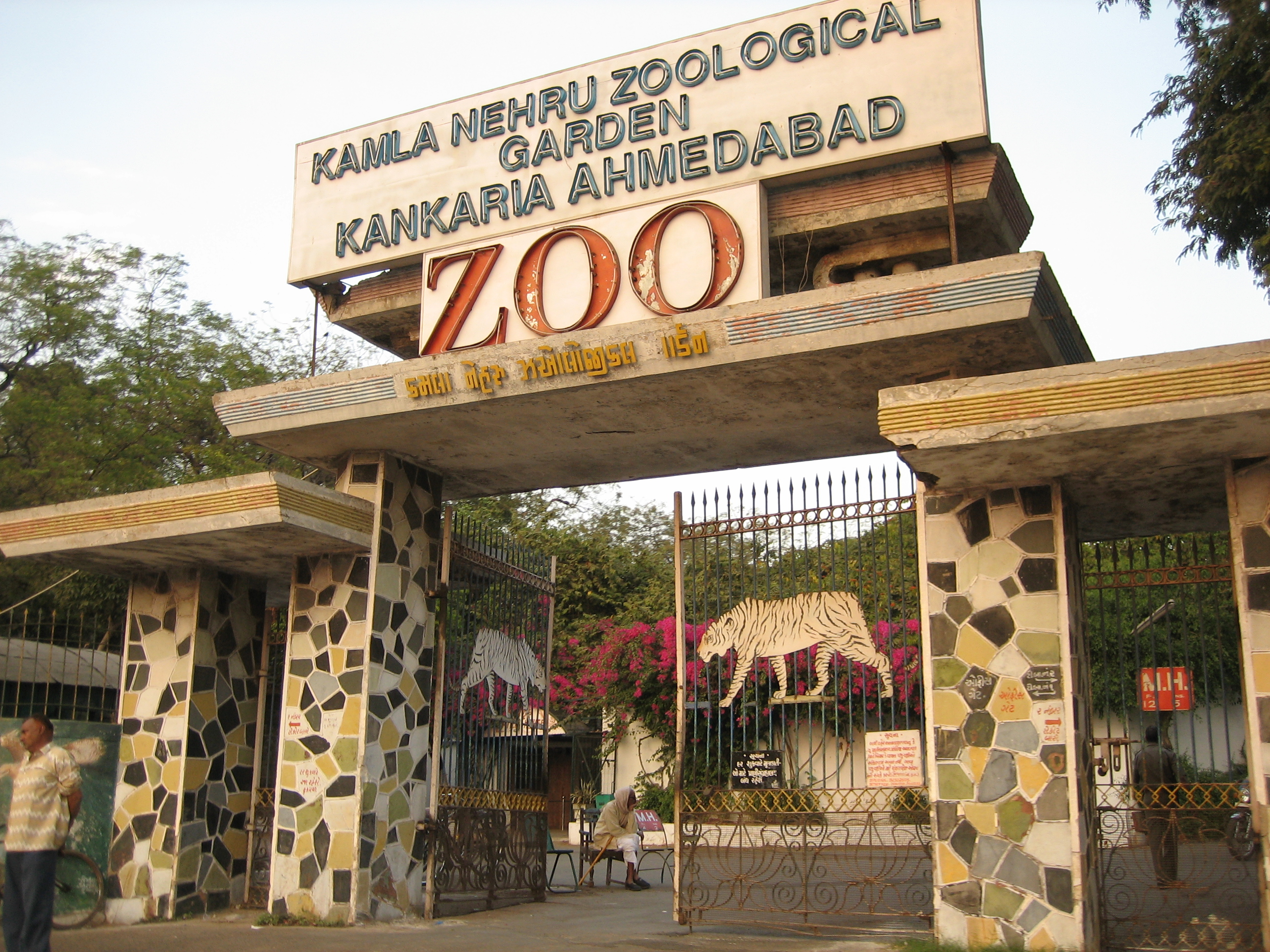 Ahmedabad 2007